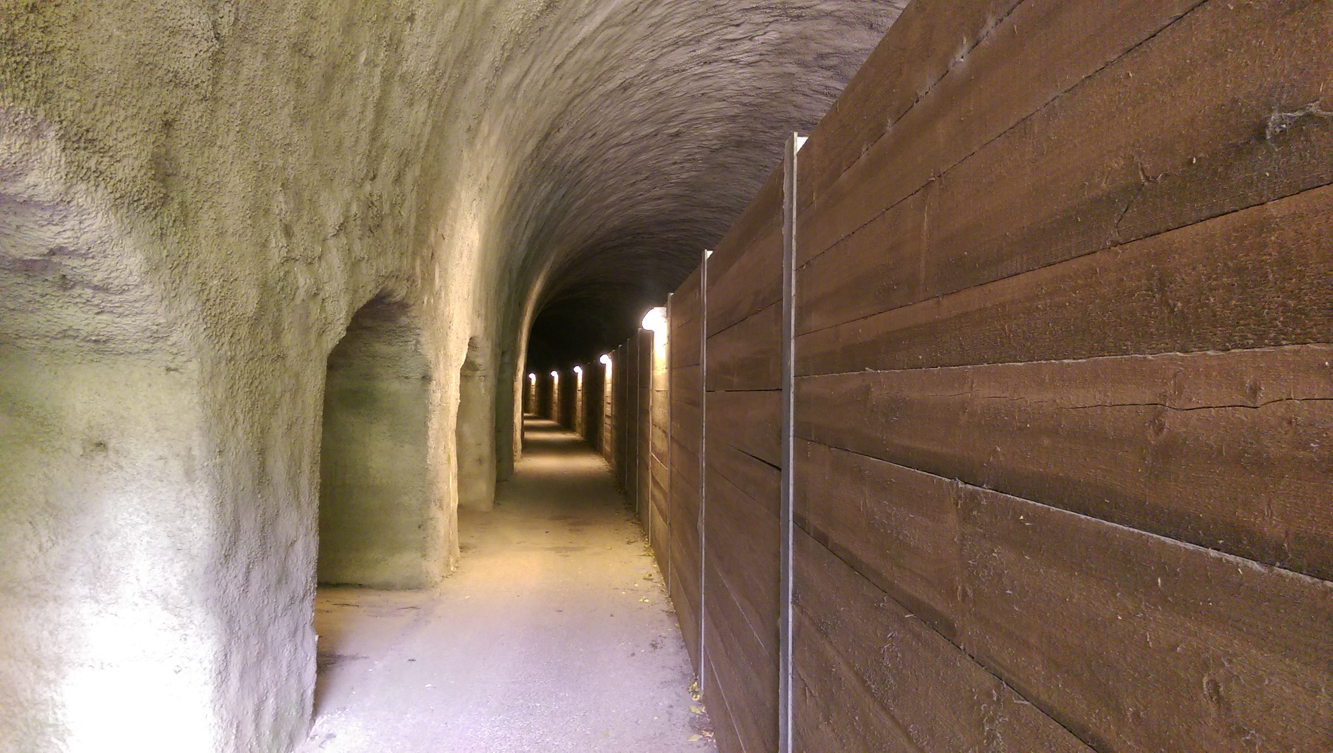 Kylltal-Radweg und Eifelstrecke im Kyller Tunnel bei Kyll an der Kyll (Ittelkyll), Gemeinde Welschbillig